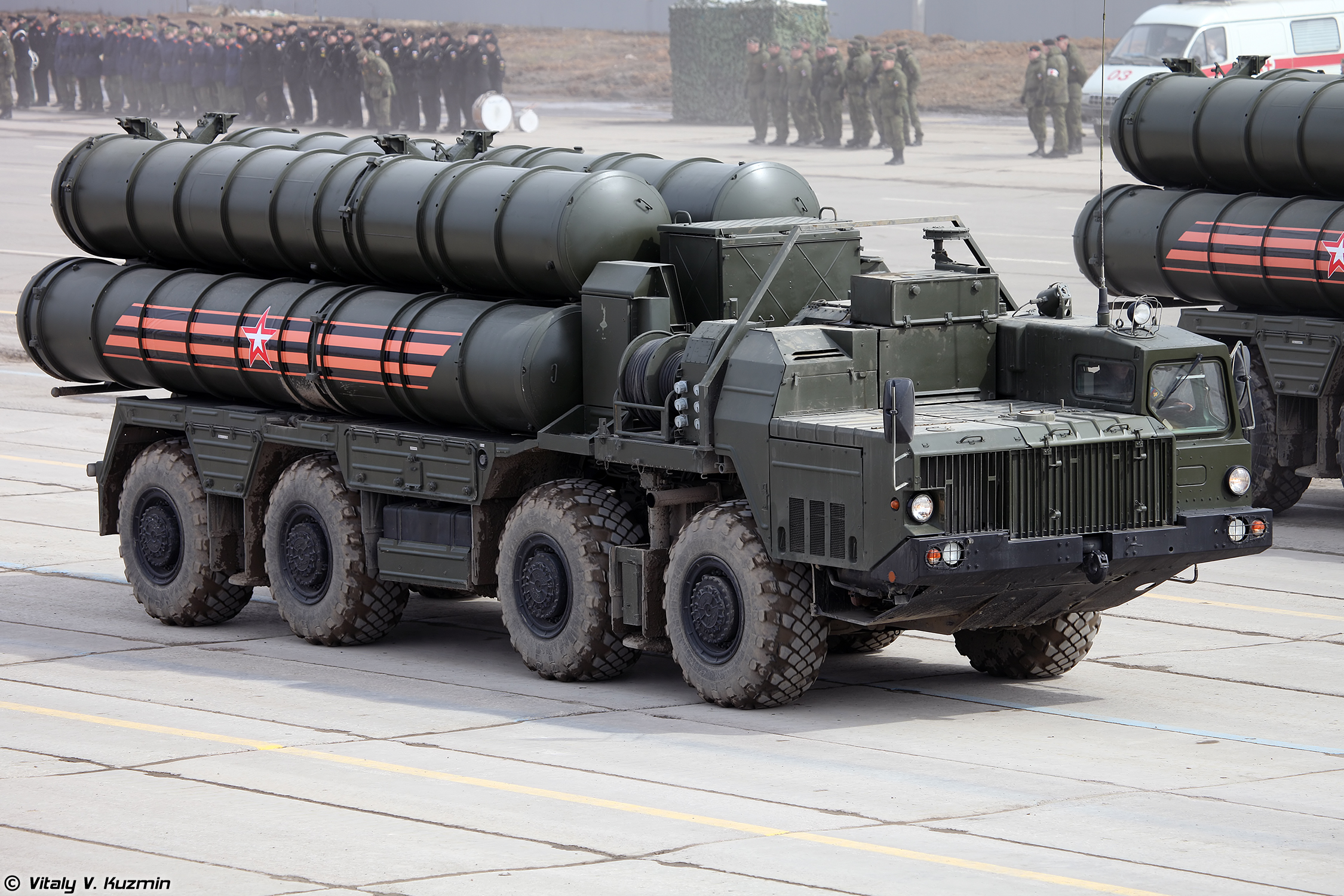 Пусковая установка 5П85СМ2-01 из состава ЗРС С-400 (5P85SM2-01 TEL for S-400 system)